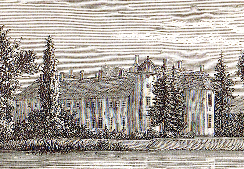 Hvedholm Slot er et gods, der ligger ca. 2 km vest for Faaborg i Horne Sogn, Sallinge Herred, Faaborg Kommune.